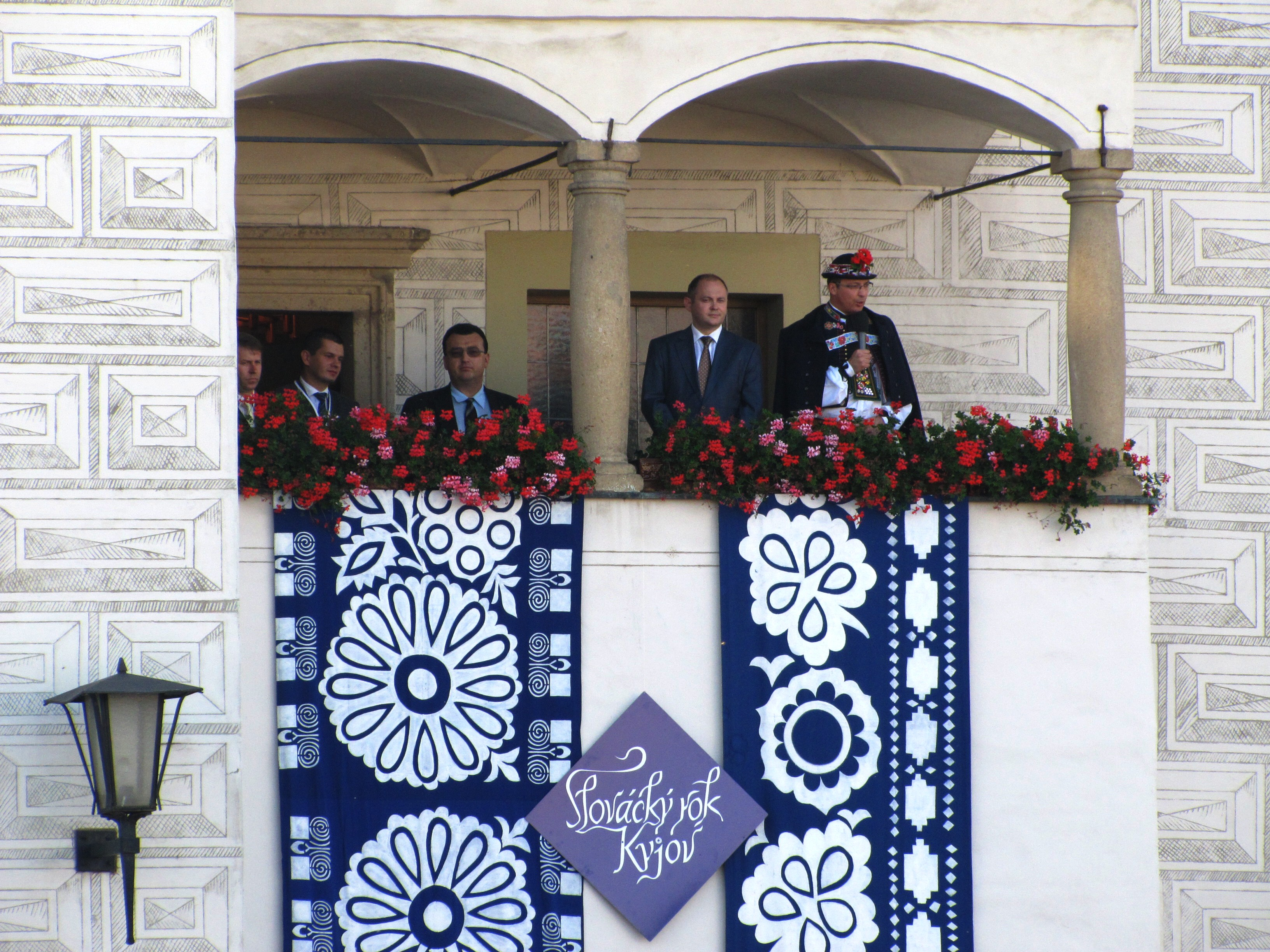 Slovácký rok v Kyjově - zahájení slavností starostou města Františkem Luklem a hejtmanem Jihomoravského kraje Michalem Haškem na balkonu radnice